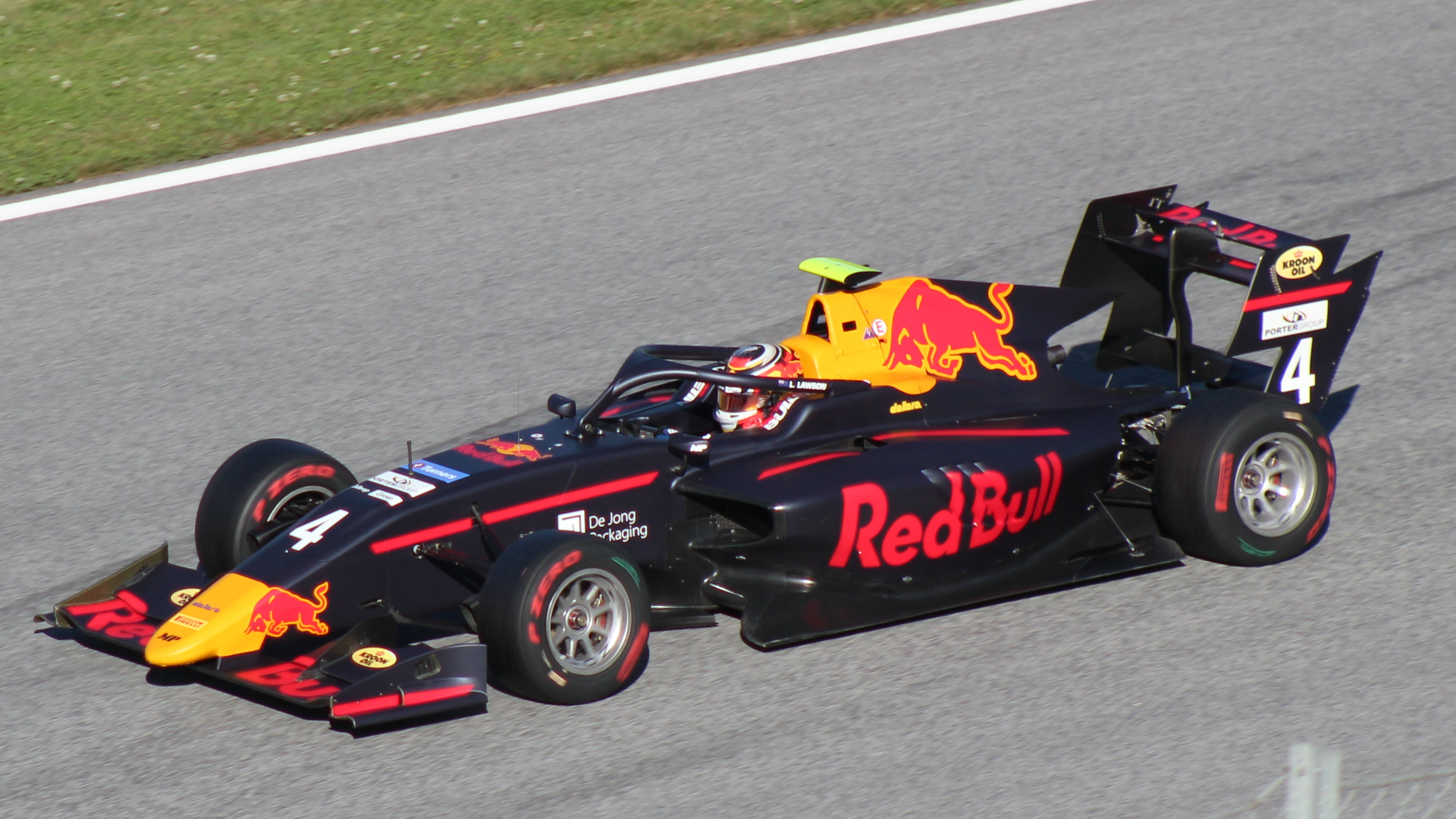 Lawson beim Rennwochenende in Österreich 2019